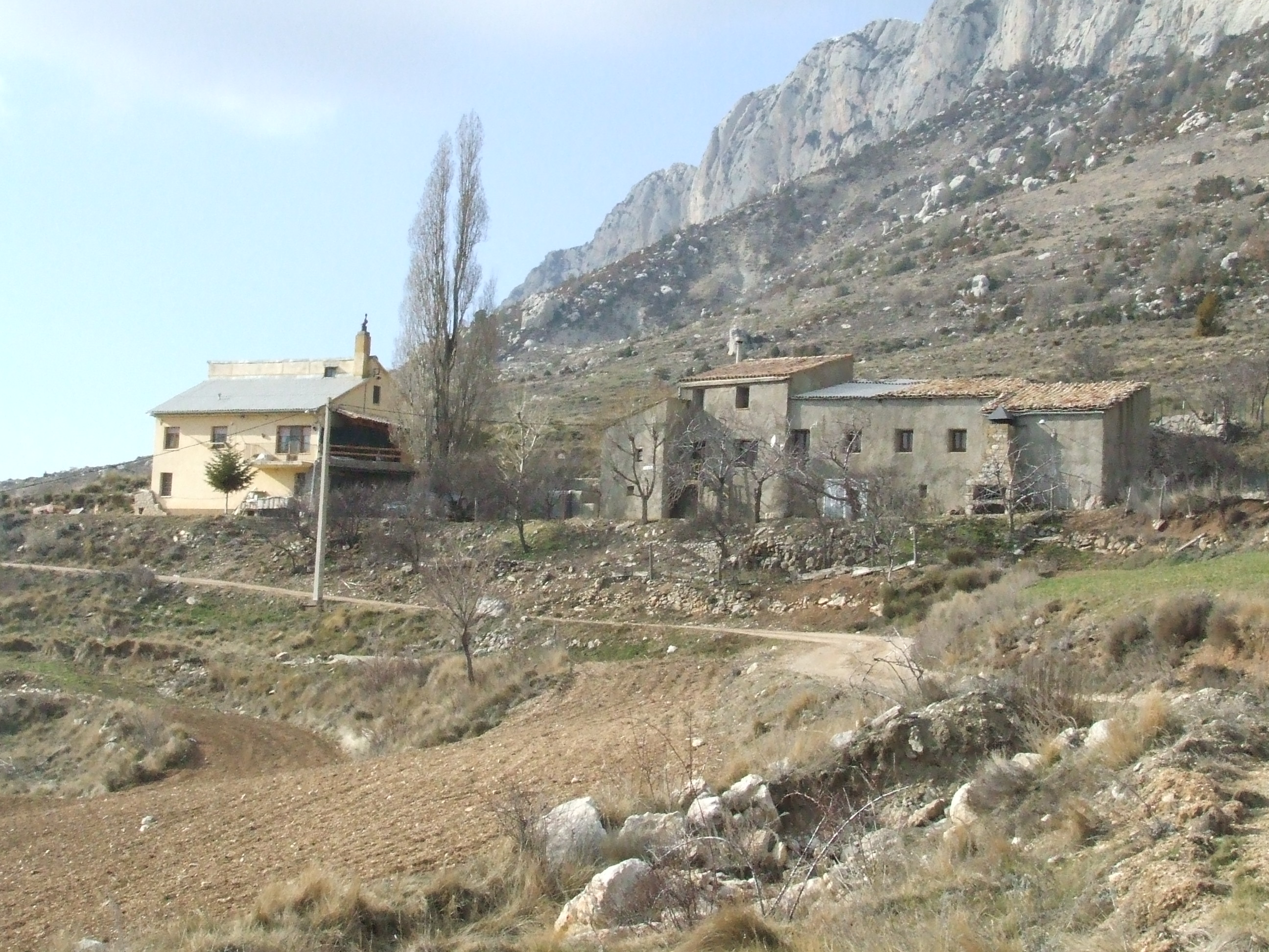 Cal Moià (Bóixols, Abella de la Conca, Pallars Jussà)